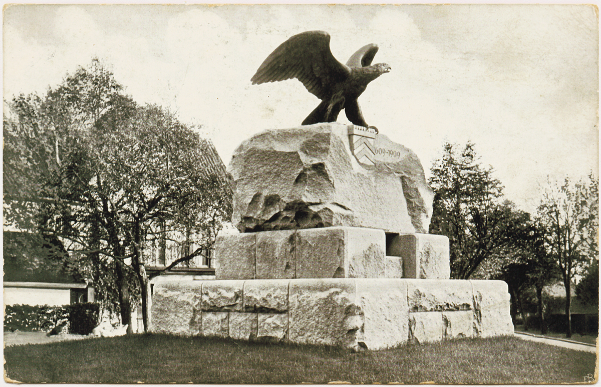 Grafschaftsdenkmal Jöllenbeck von 1909 (Historische Postkarte)